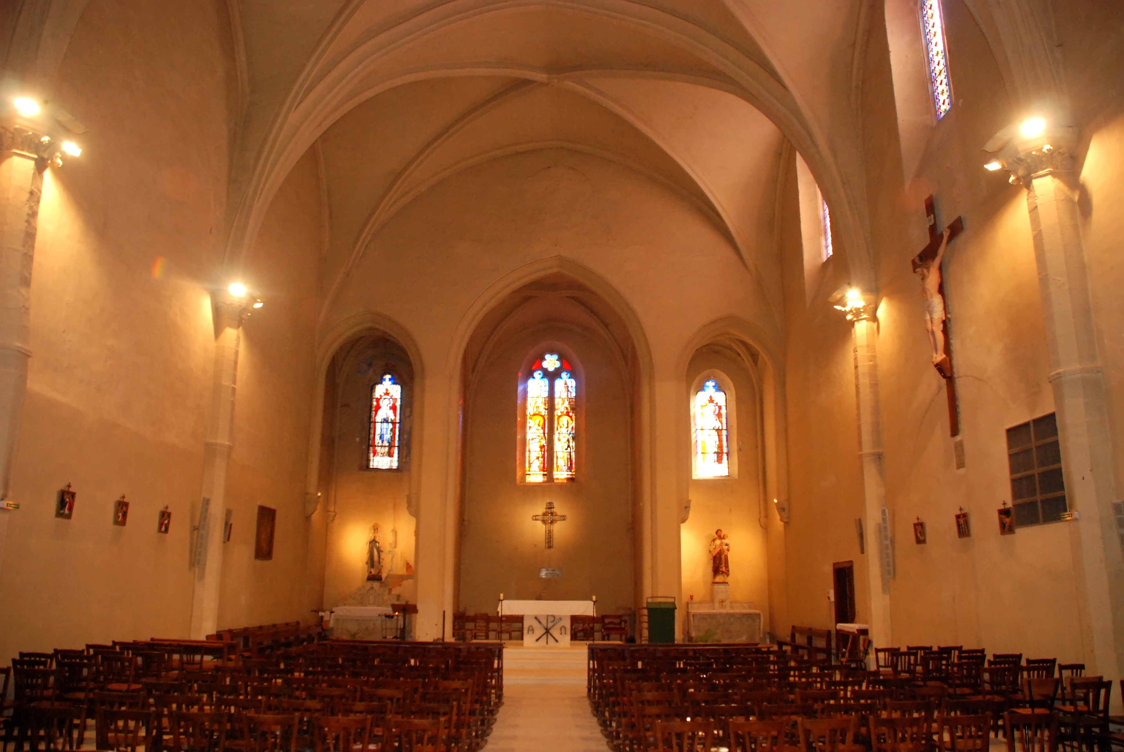 France - Gard - Église Saint-Saturnin de Calvisson